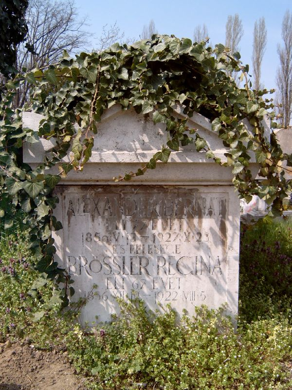 Alexander Bernát sírja Budapesten a Kozma utcai izraelita temetőben.